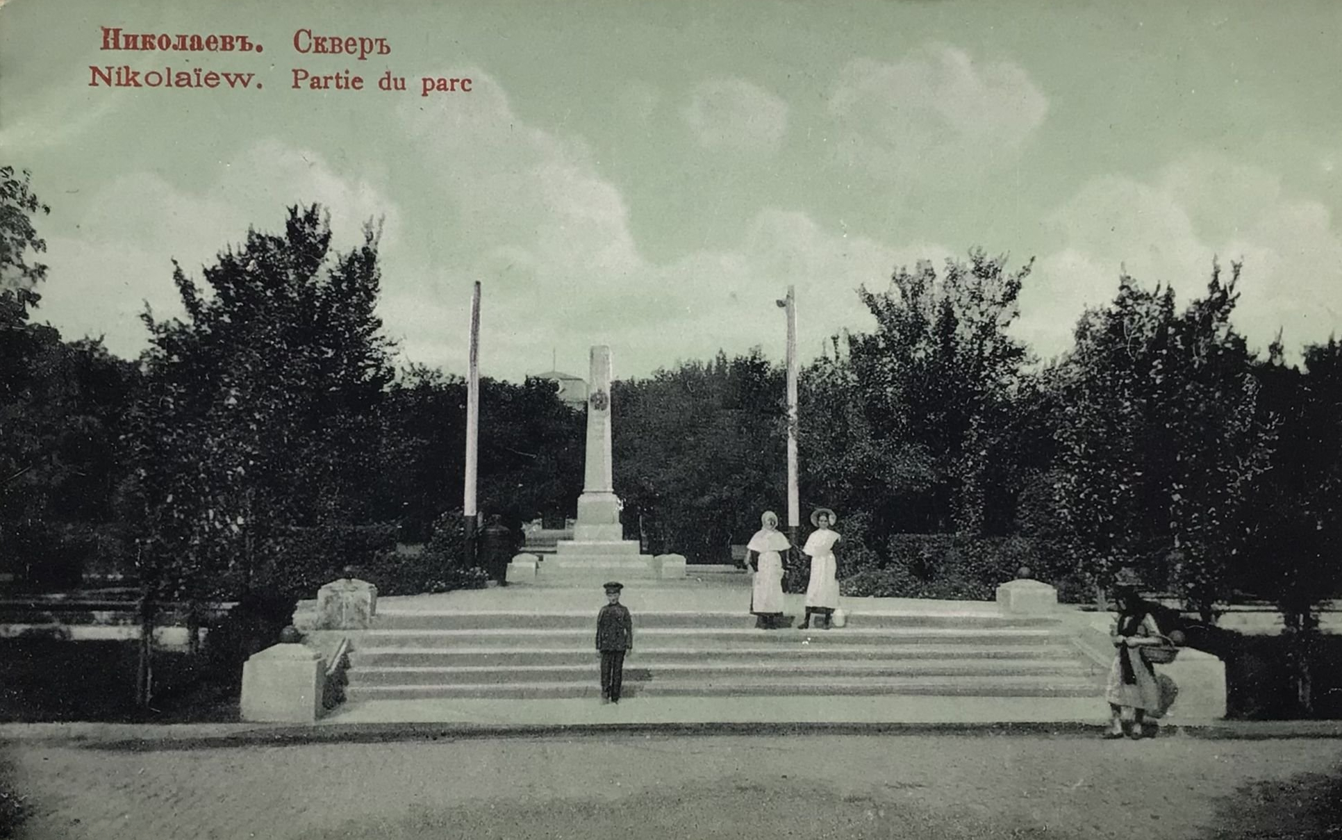 « Nikolaïew. Partie du parc »